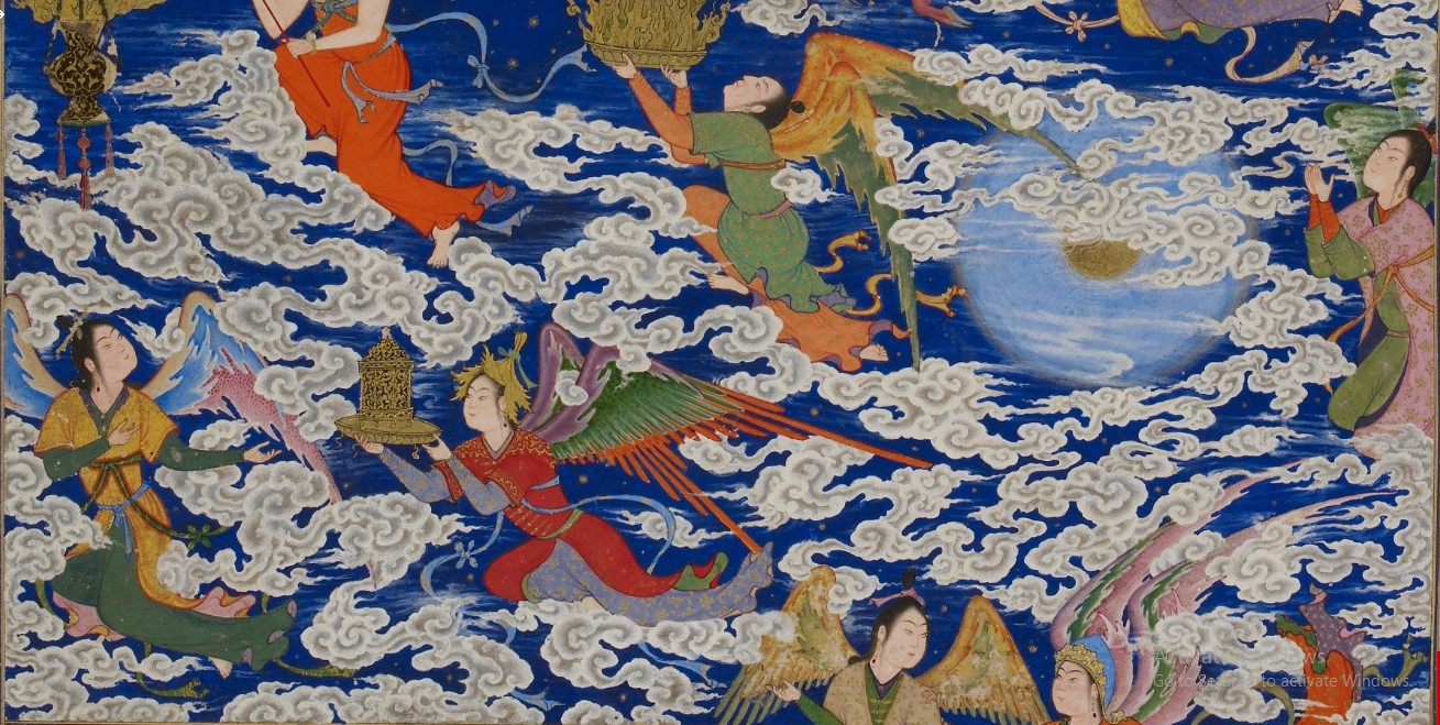 Sultan Məhəmməd - Peyğəmbərin meracı detal.jpg.